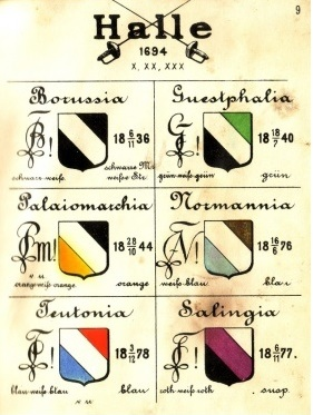 Farbenschilde und Zirkel der 6 Corps im Hallenser SC (1884)